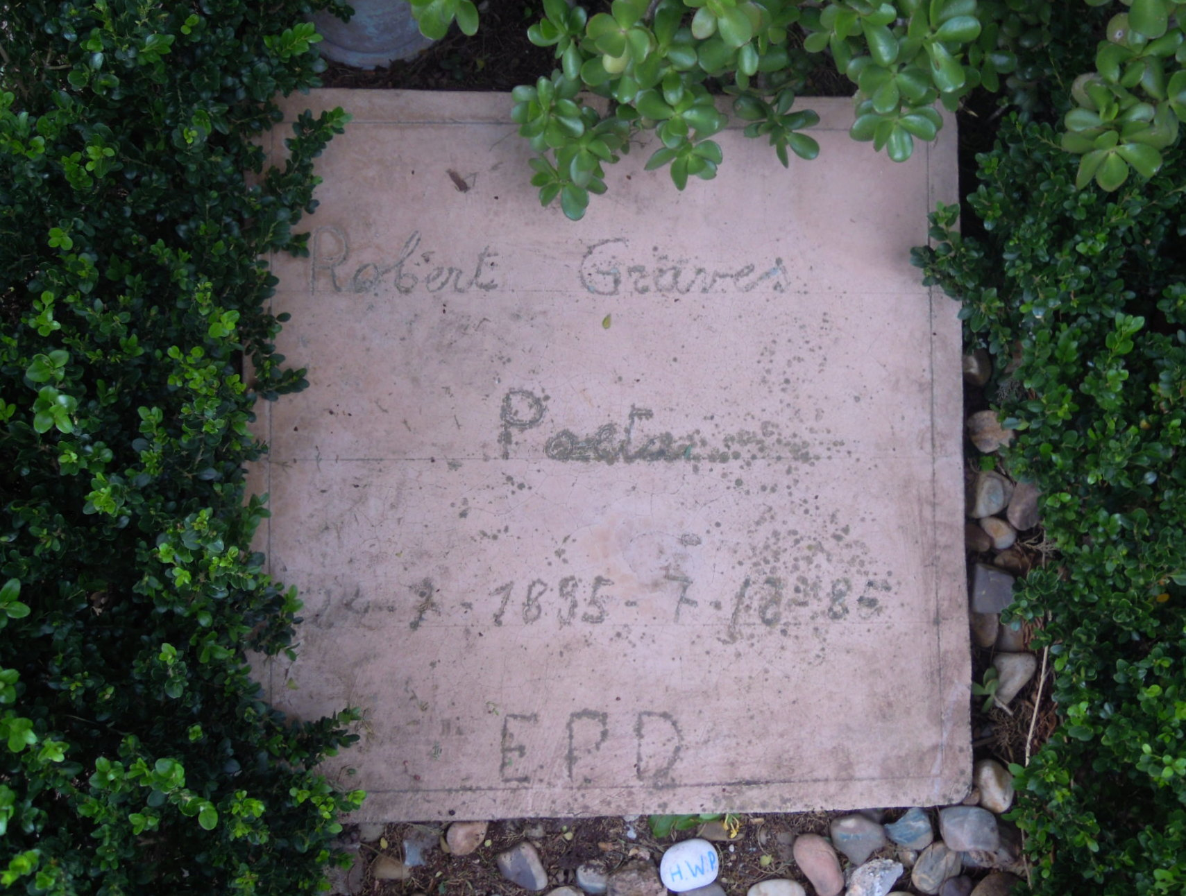 Lápida da tumba de Robert Graves no cemiterio de Inca